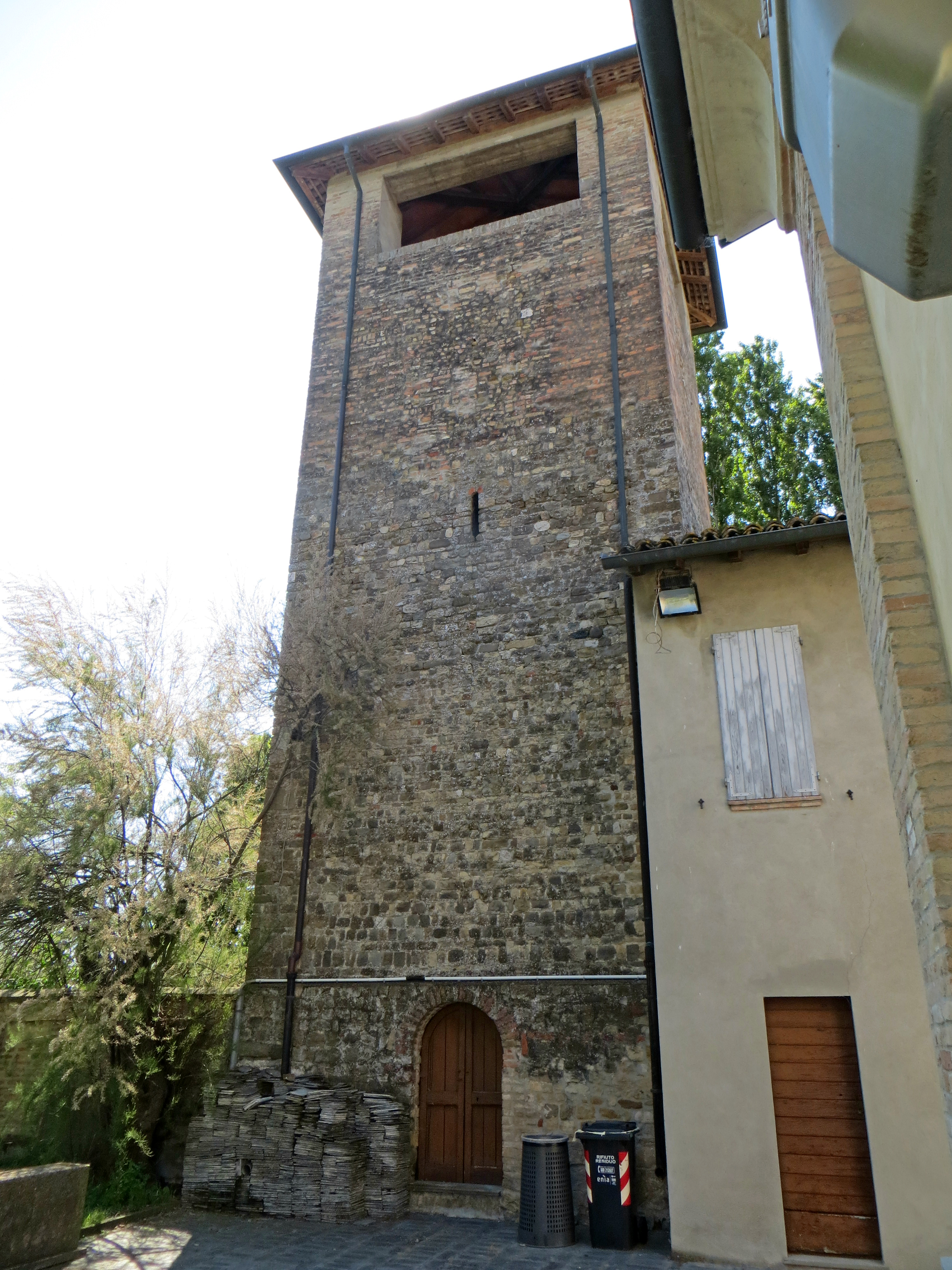 Chiesa di San Giovanni Evangelista (Castelnovo - Parma) - campanile